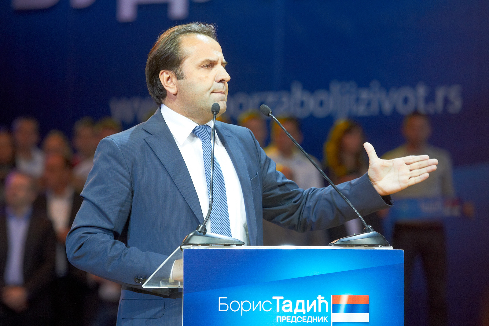 Predsednik SDPS-a Rasim Ljajić obratio se građanima na završnoj konvenciji u Beogradskoj areni. (17. maj 2012); Foto servis DS